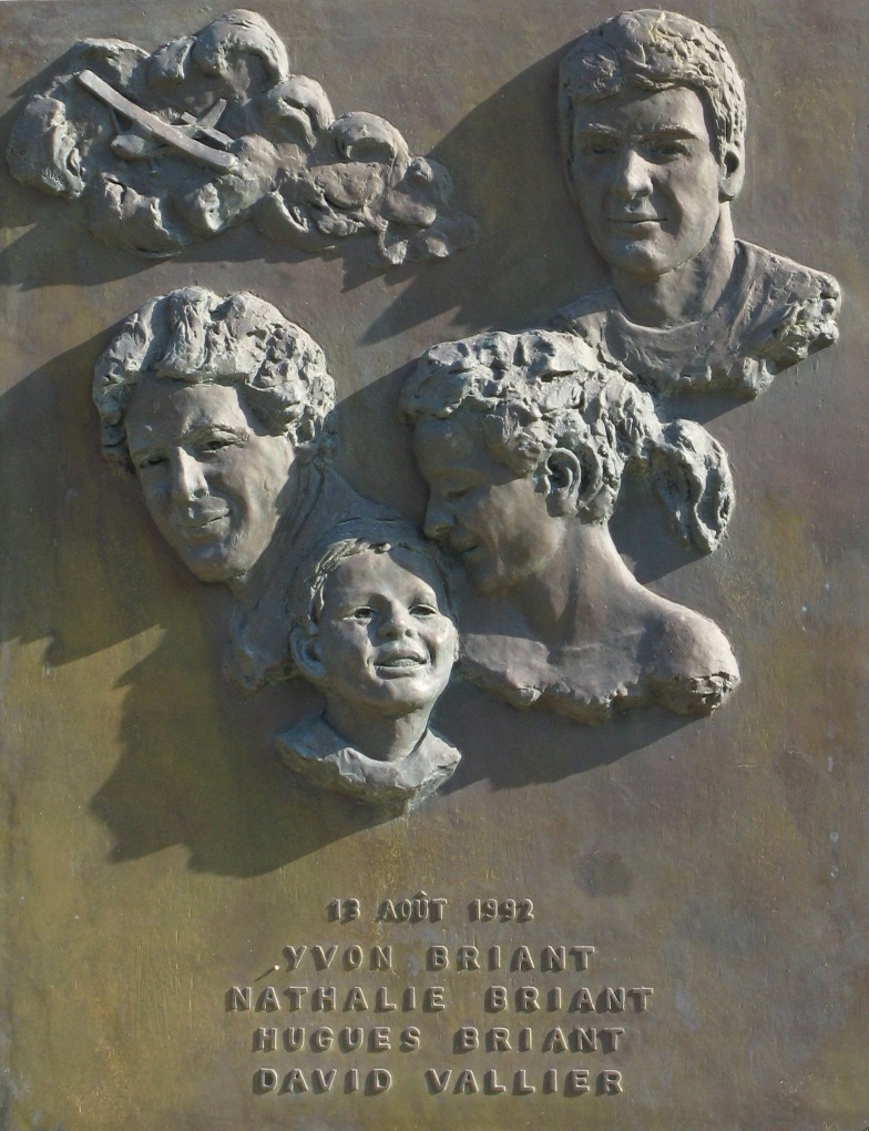 Plaque en souvenir d'Yvon Briant au Col de Marsolino